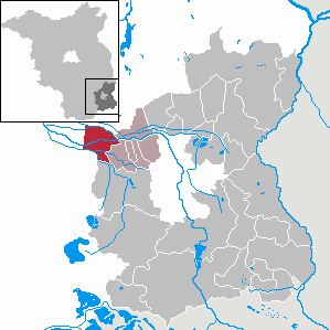 Burg (Spreewald) in Brandenburg (Country) - District Spree-Neiße